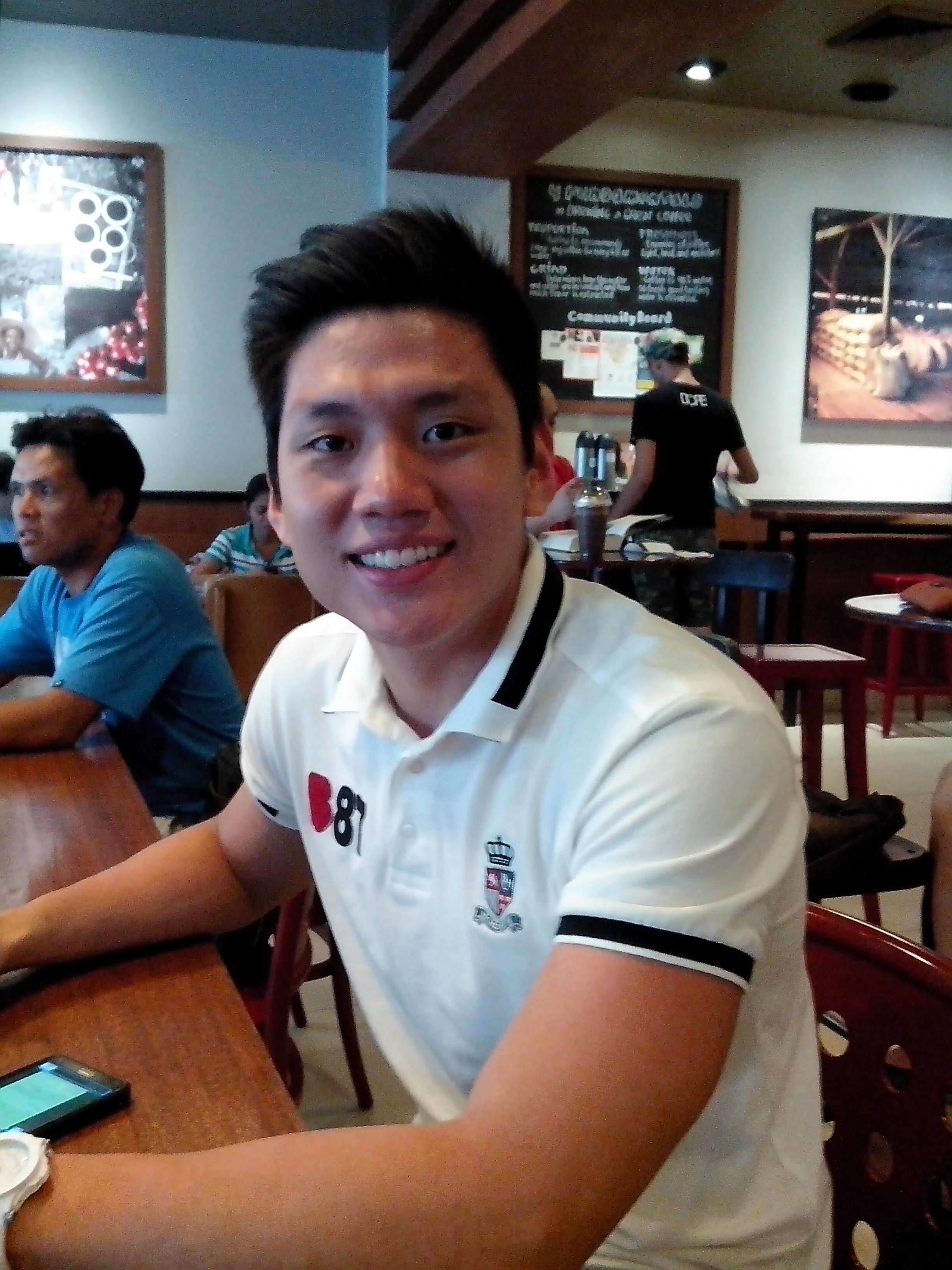 Jeron Teng Filipino Basketball Player